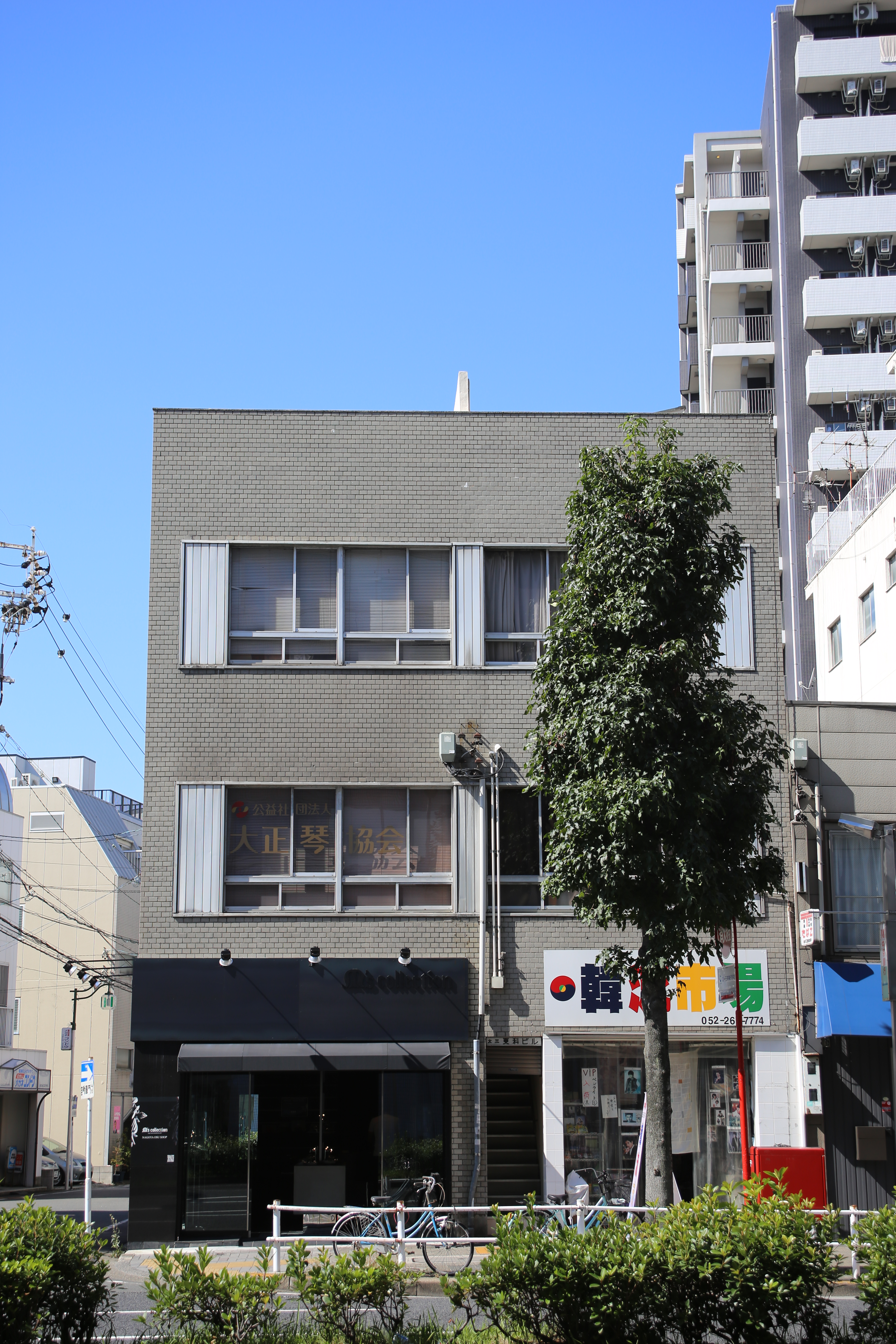 名古屋市中区大須三丁目の高栄ビルを東側公道より撮影